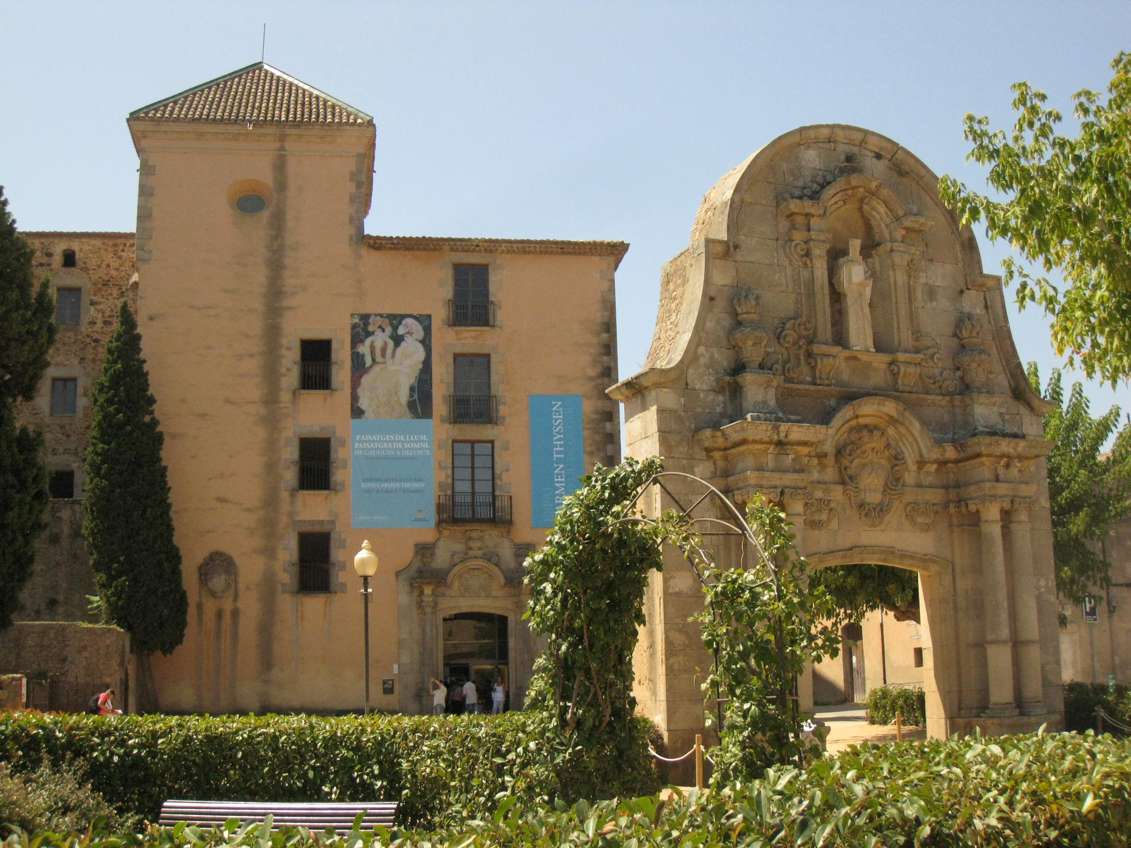 Monestir de Sant Feliu (Sant Feliu de Guíxols)